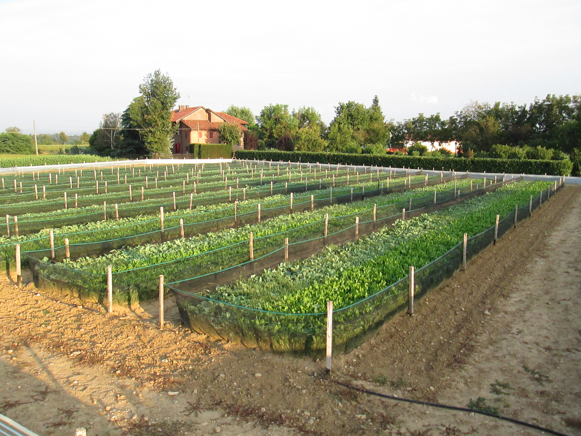 Allevamento di lumache biologico